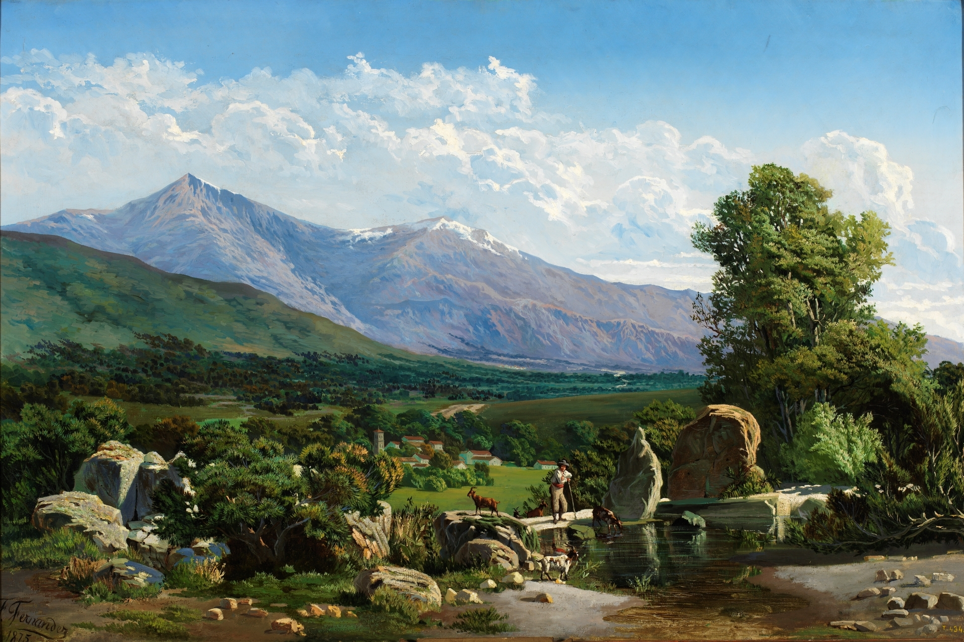 Vista del municipio de Collado Villalba, situado en la Comunidad de Madrid, (España).